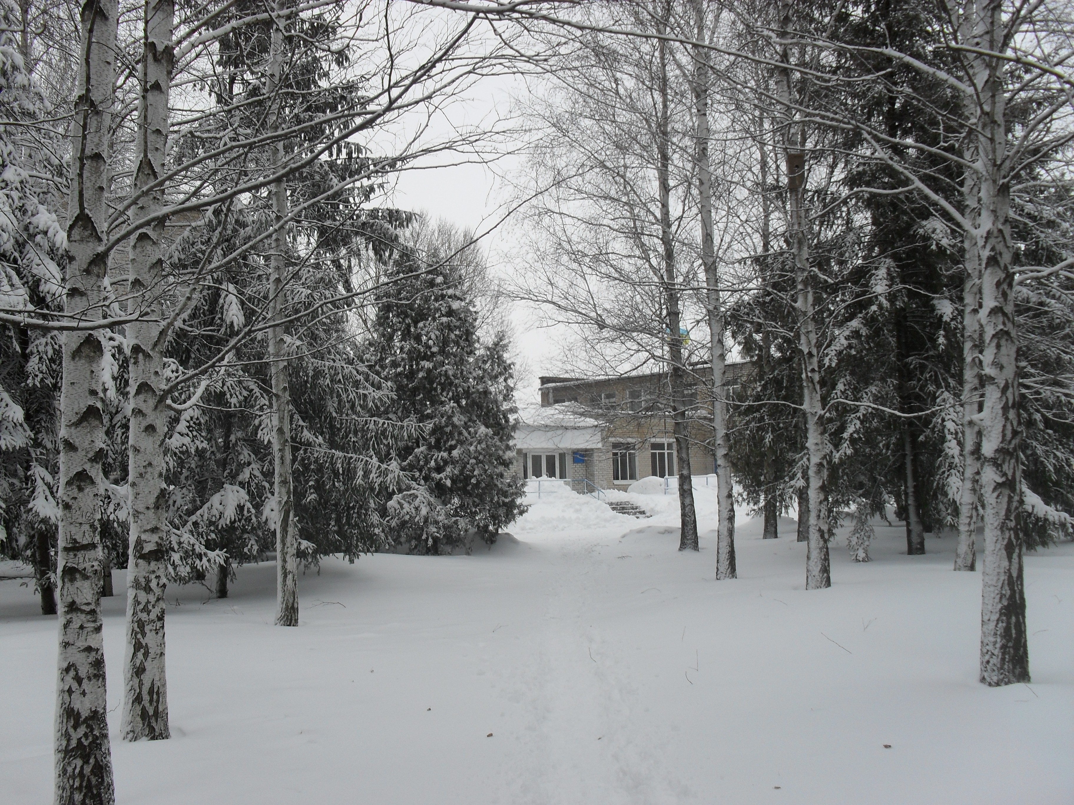 Широківська СЗШ взимку 2010 року